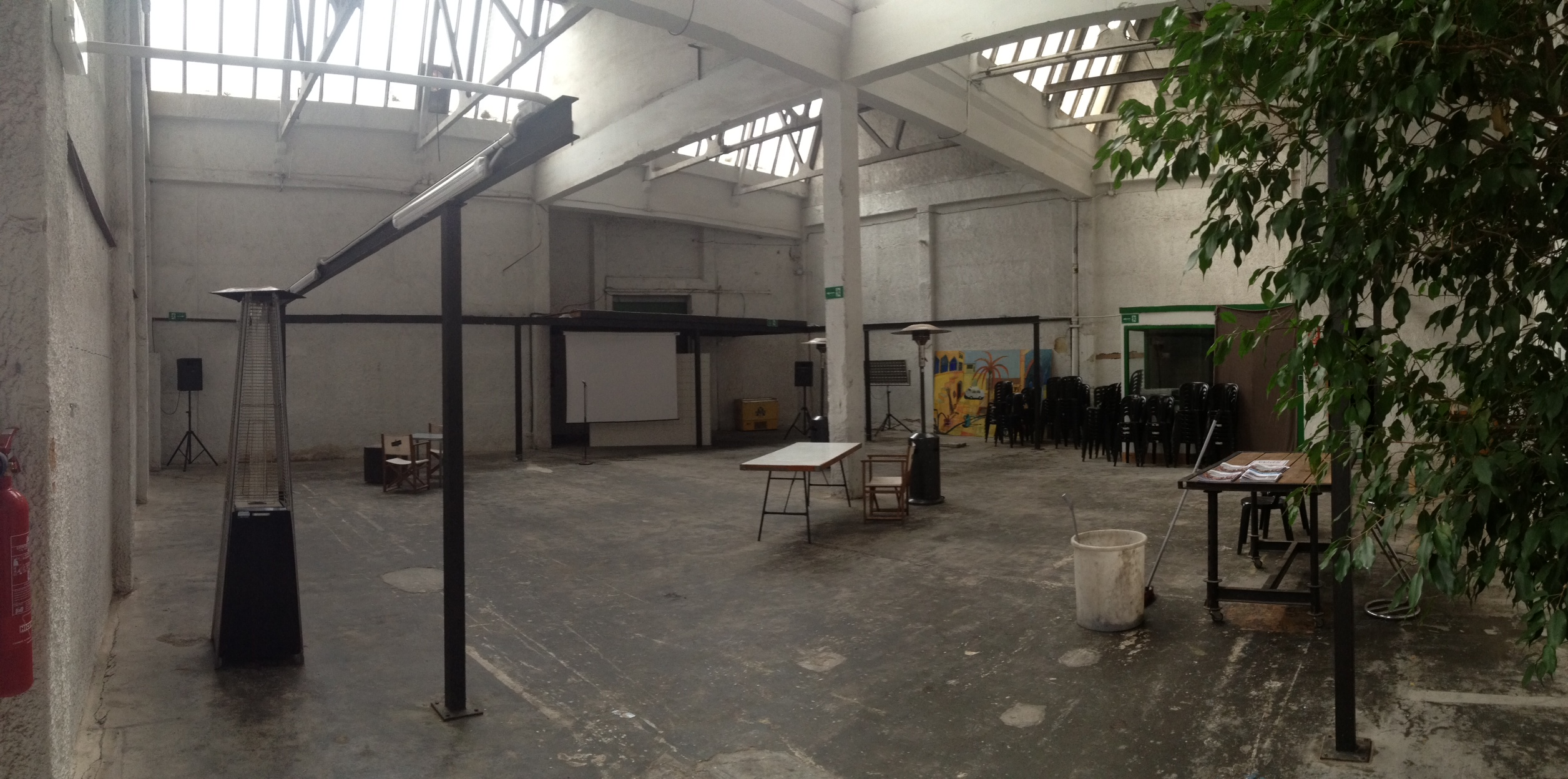 Una de las naves centrales del complejo, noviembre de 2016.